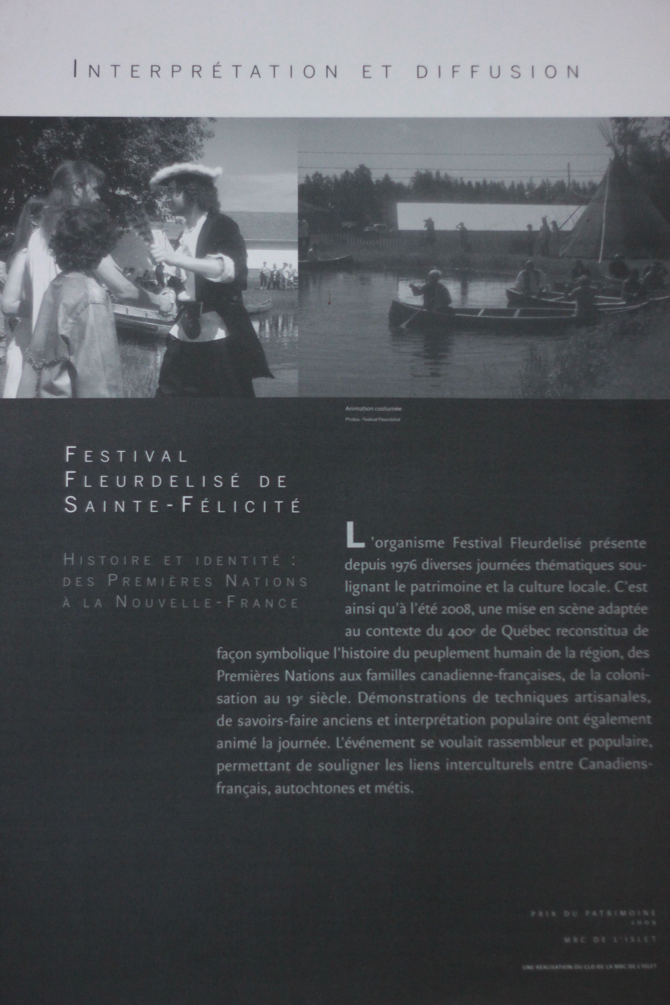 Prix octroyé au Festival Fleurdelisé en 2009.